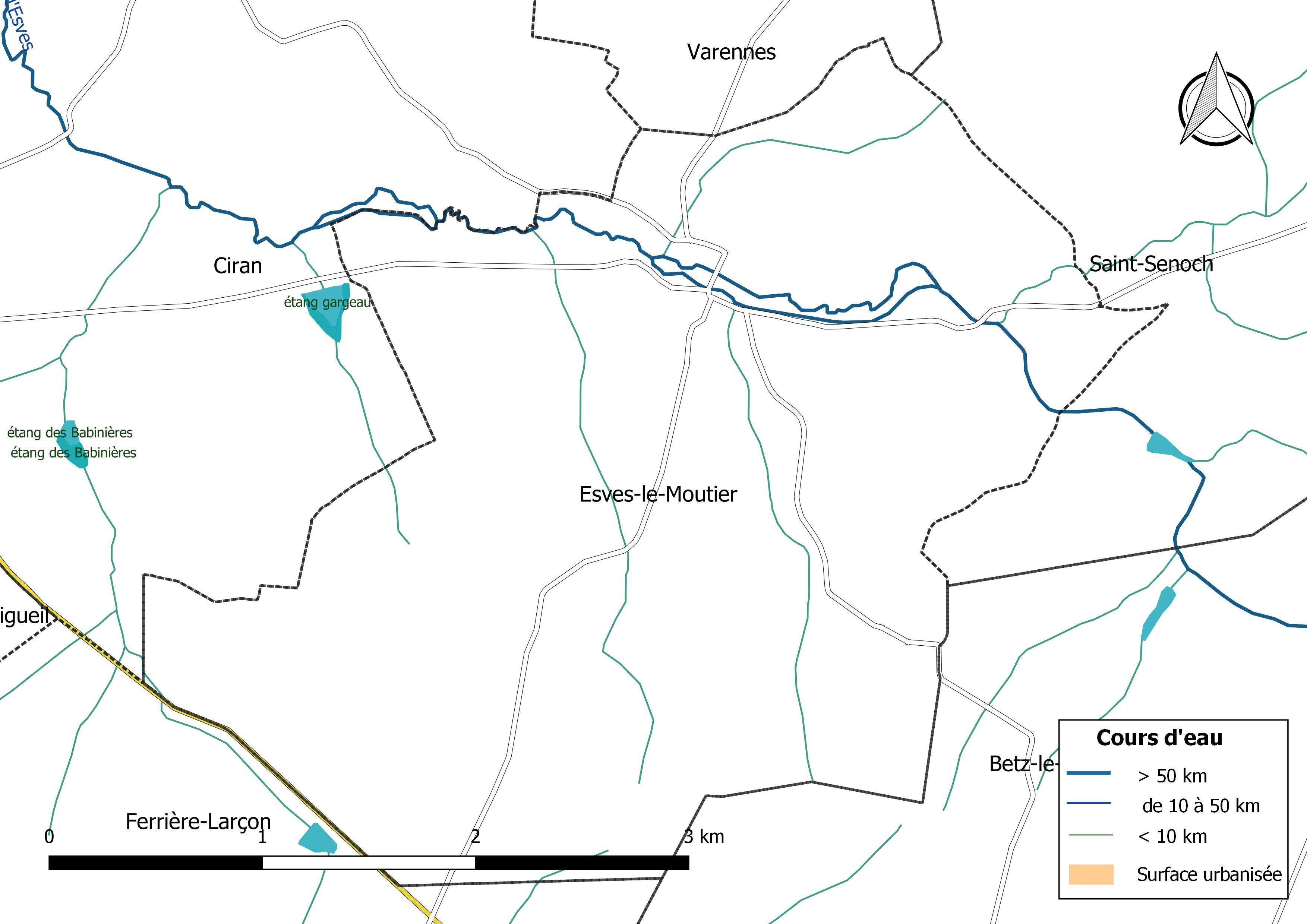 Carte du réseau hydrographique de la commune de Esves-le-Moutier (France).